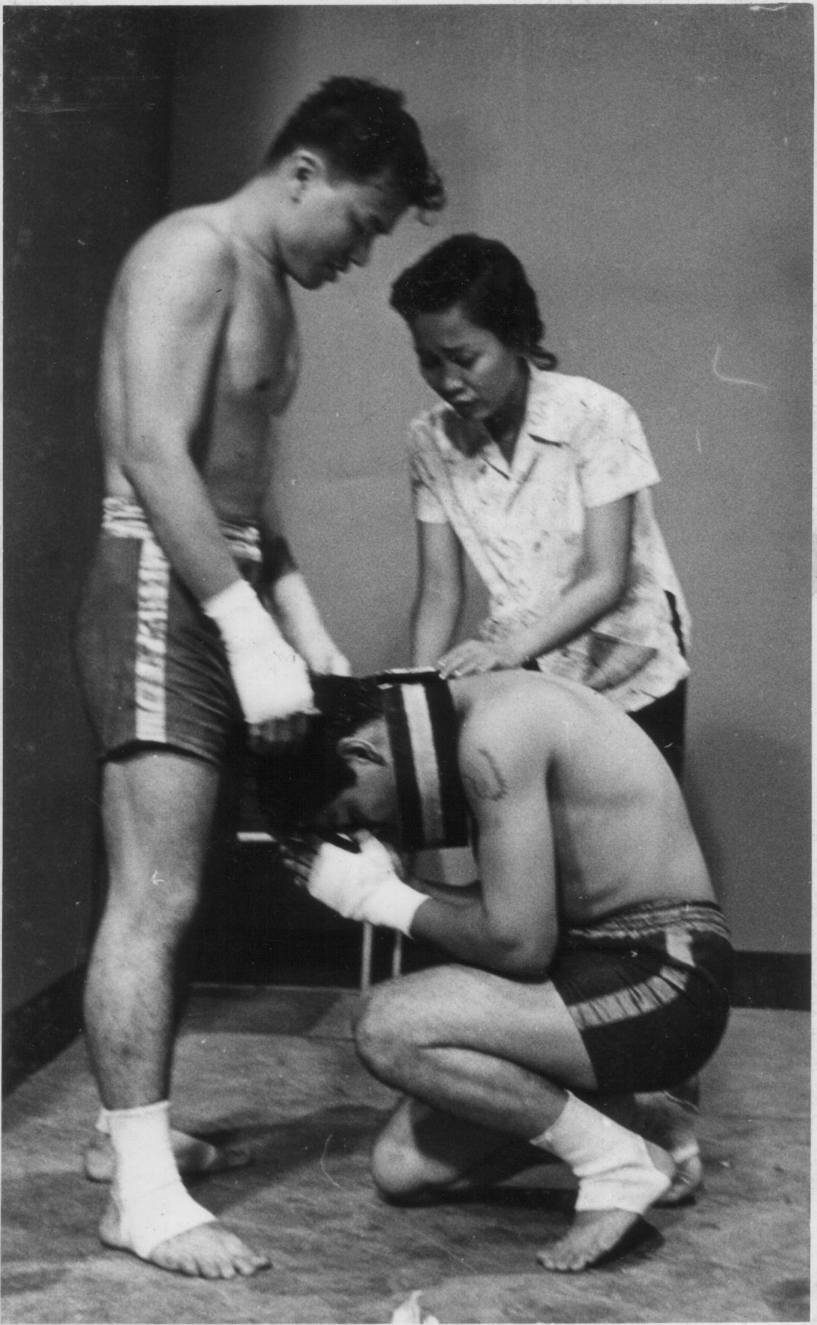 สมจินต์ ธรรมทัต อาคม มกรานนท์ กัณฑรีย์ นาคประภา ในละคร เสือเก่า ช่อง 4 บางขุนพรหม